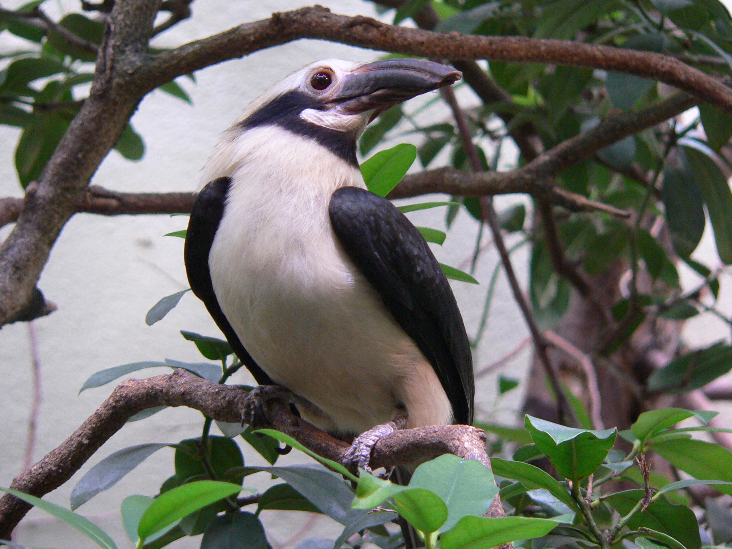 Polillo Tarictic Hornbill, Penelopides manillae subnigra